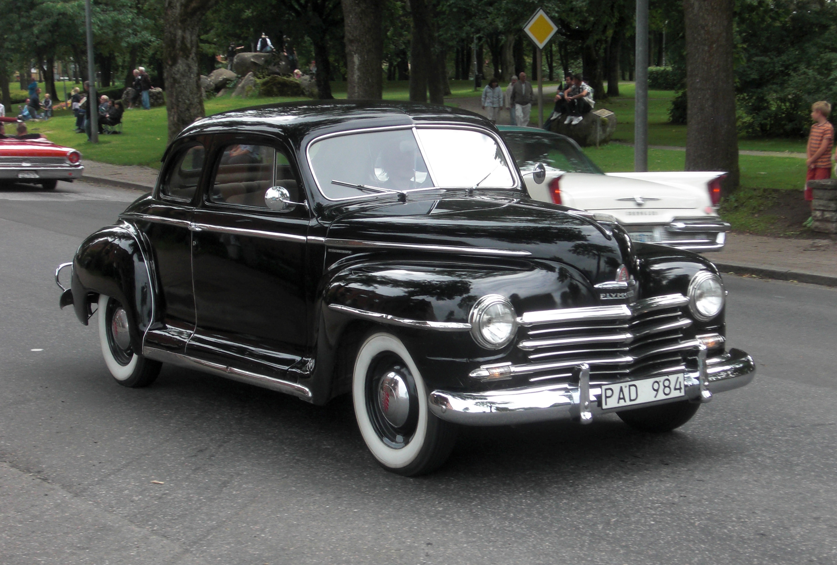 En Plymouth Special De Luxe 1947 på cruising på Ströget (Sankt Olofsgatan) i Falköping 2010-07-31.